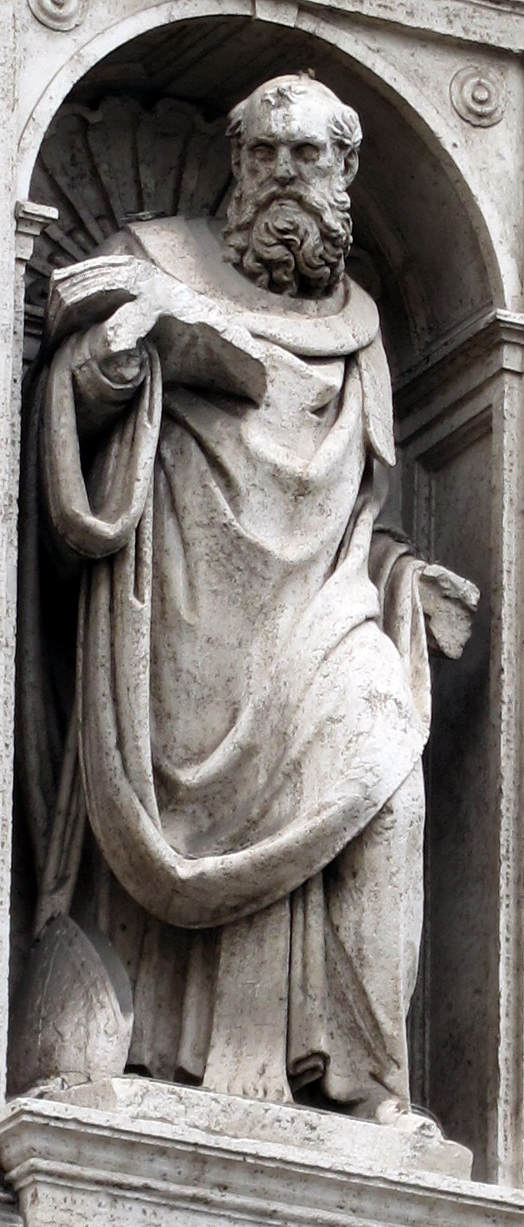 Santa Maria Maggiore (Roma)